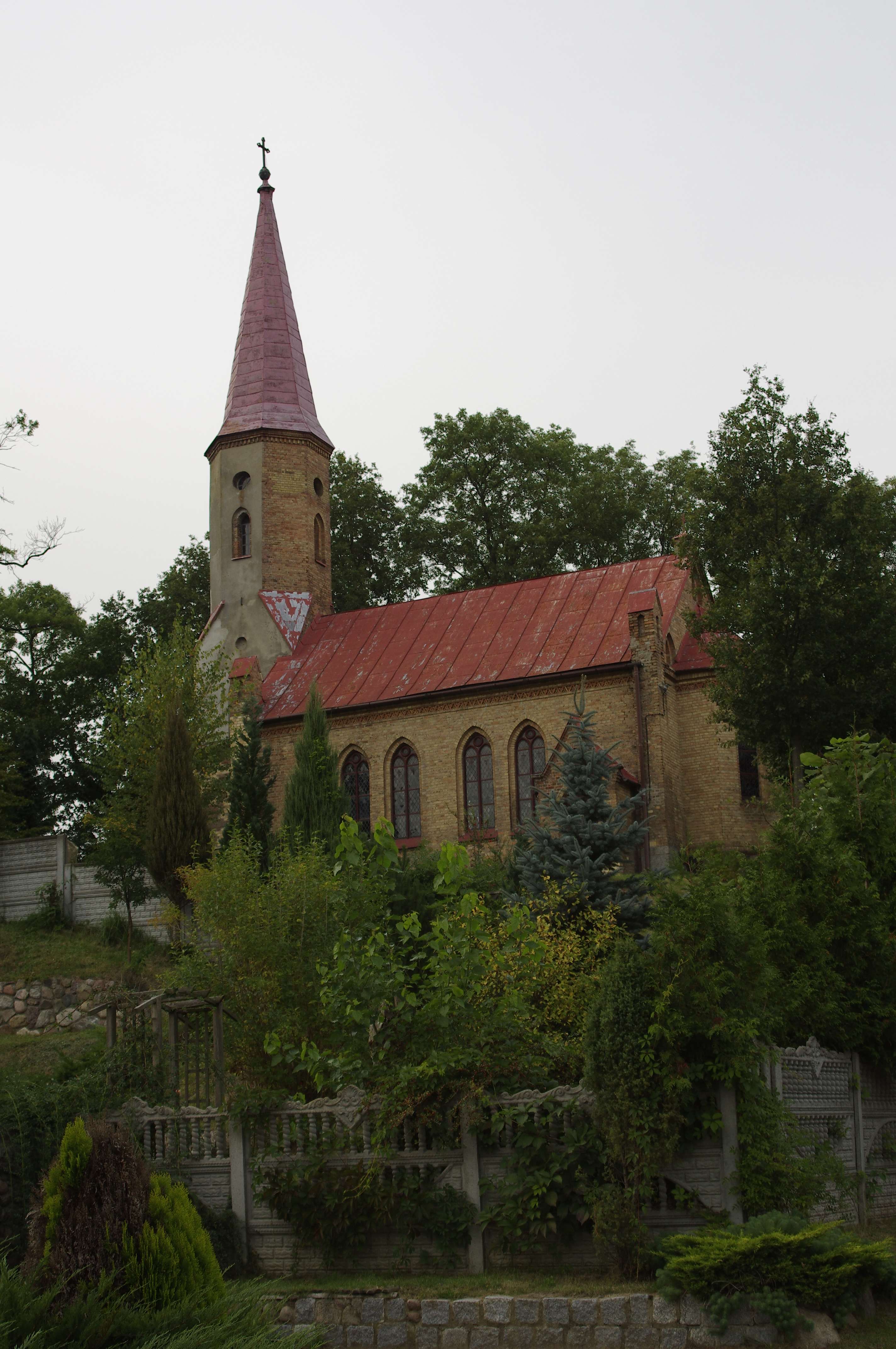 Winniki - dawny kościół ewangelicki, obecnie rzymskokatolicki filialny p.w. św. Karola Boromeusza, 1850